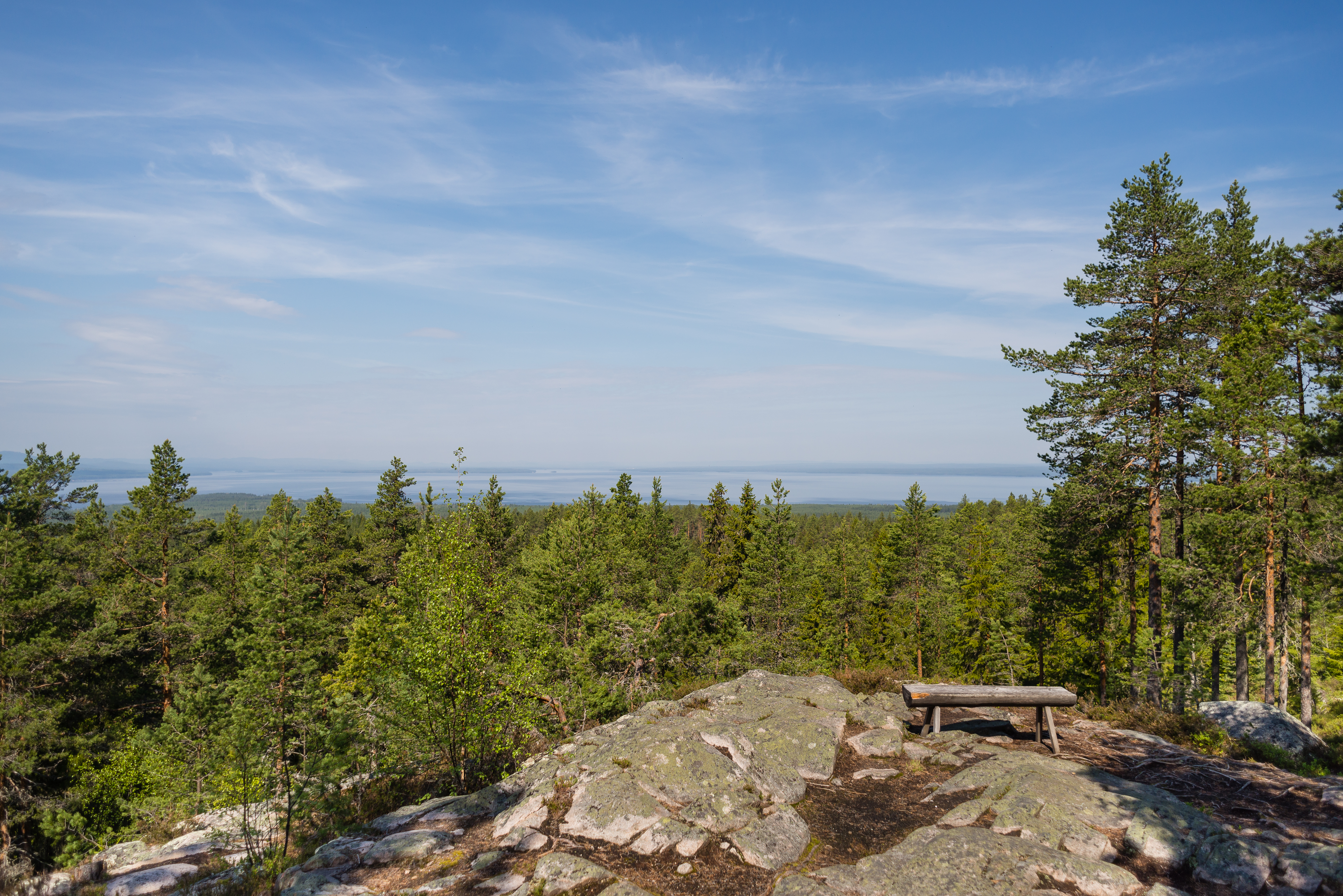 Lake Siljan seen from mount Björkberget in Siljansnäs nature reserve.